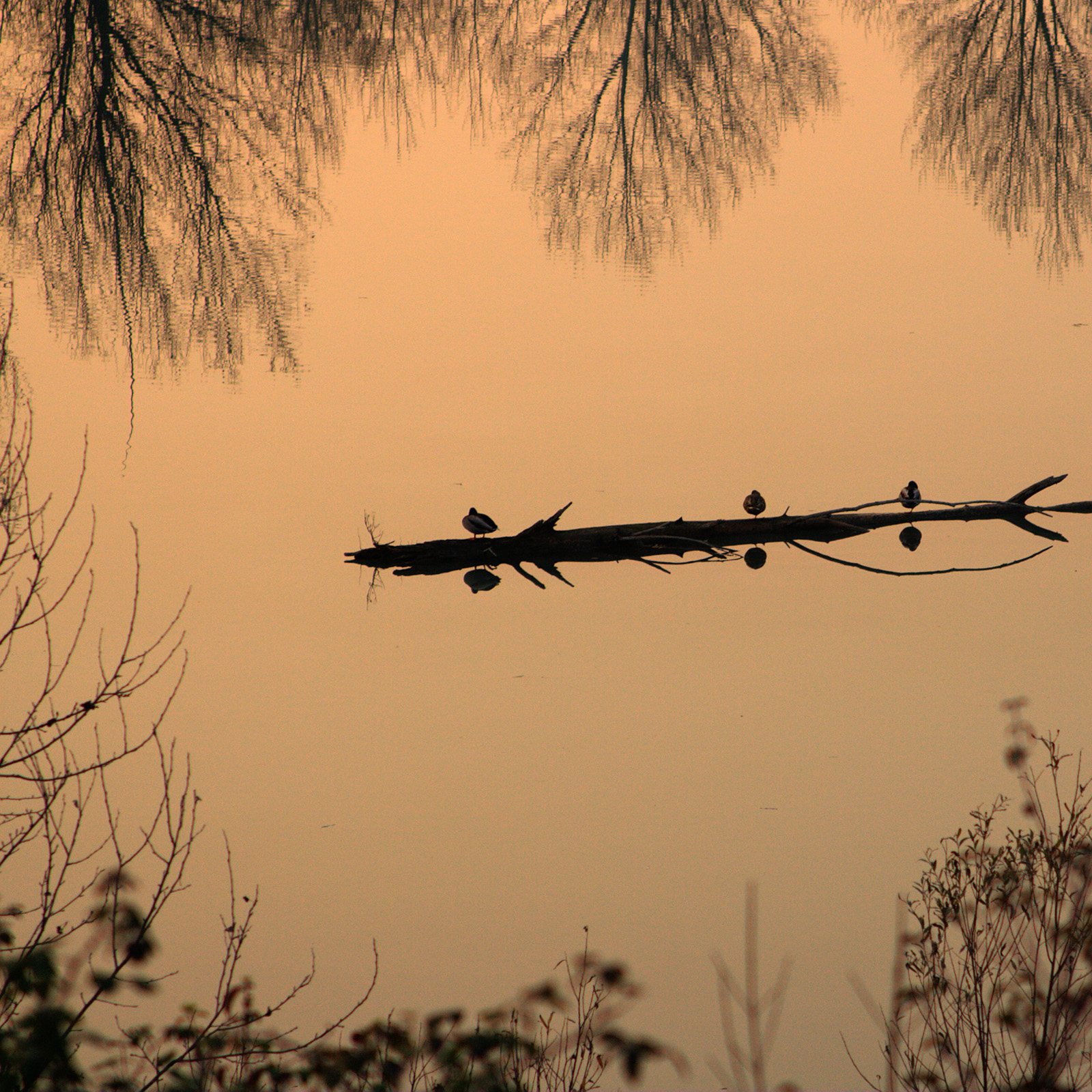 Cassa di espansione fiume Secchia Campogalliano (MO)